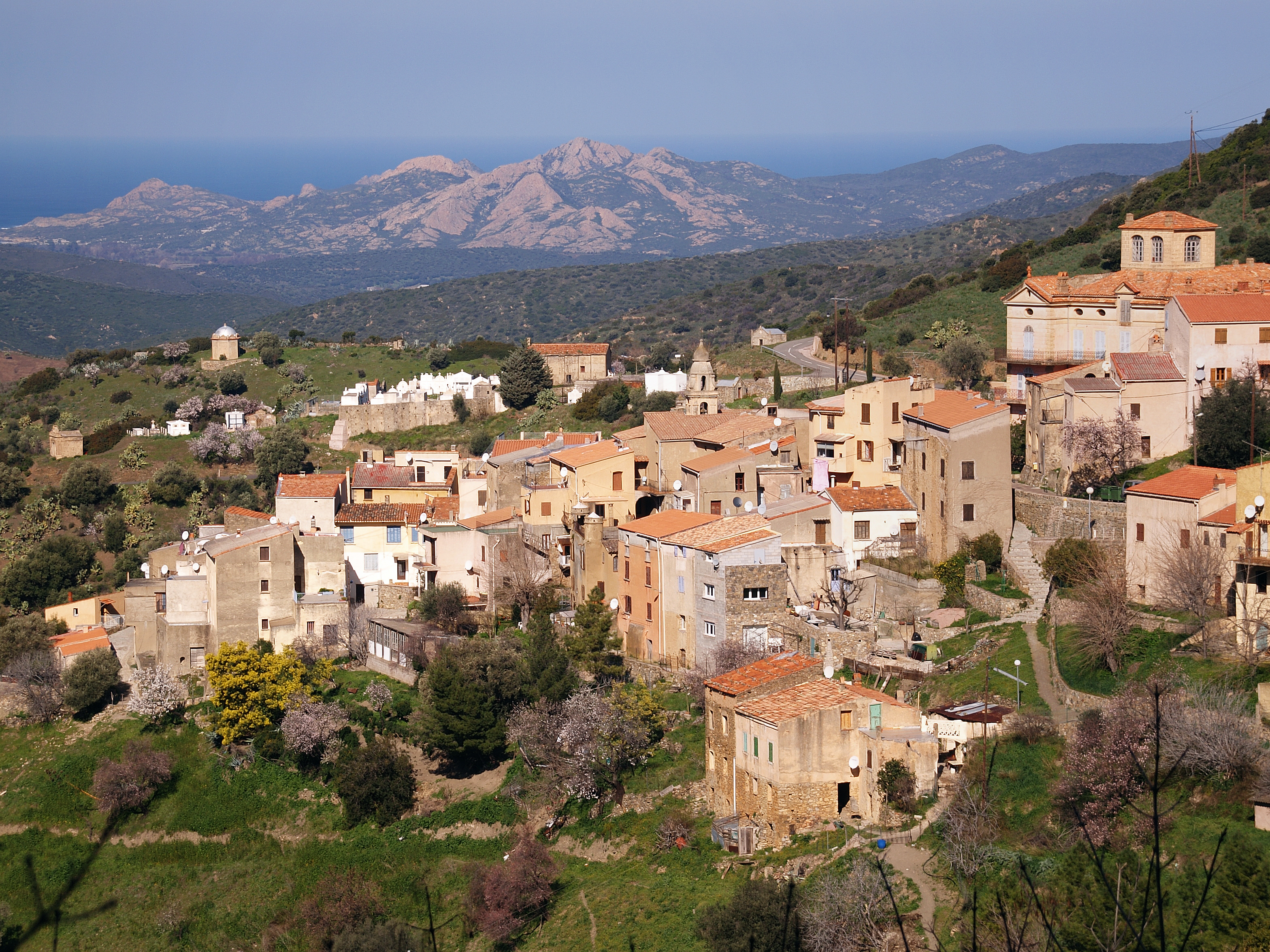 Novella (Corsica) - Vue du village